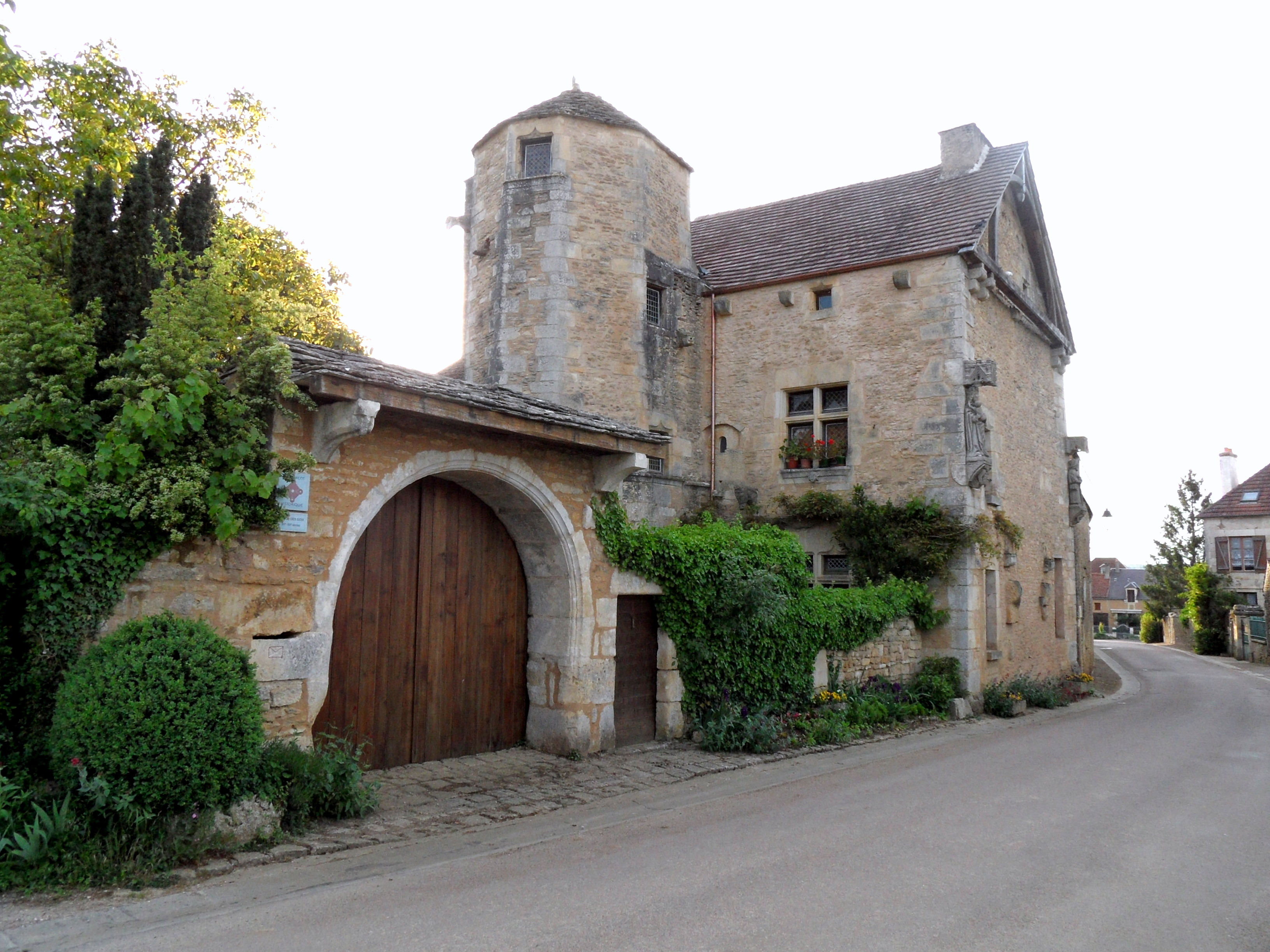 Coutarnoux (Yonne) : Maison des Goix (XVe siècle)